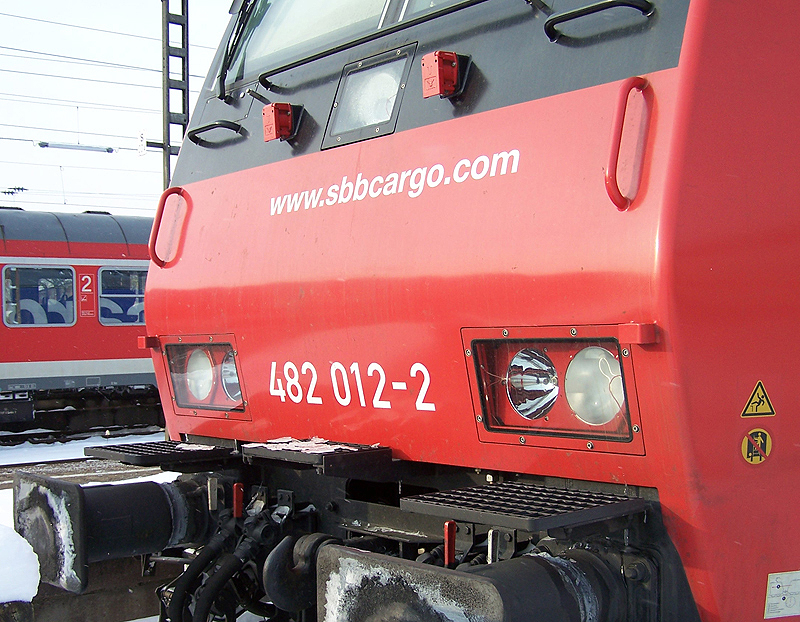 Front der Baureihe 482